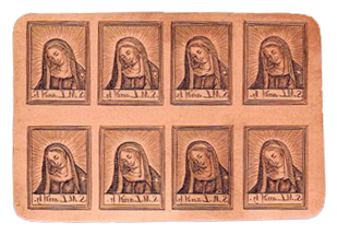 Schluckbildchenbogen